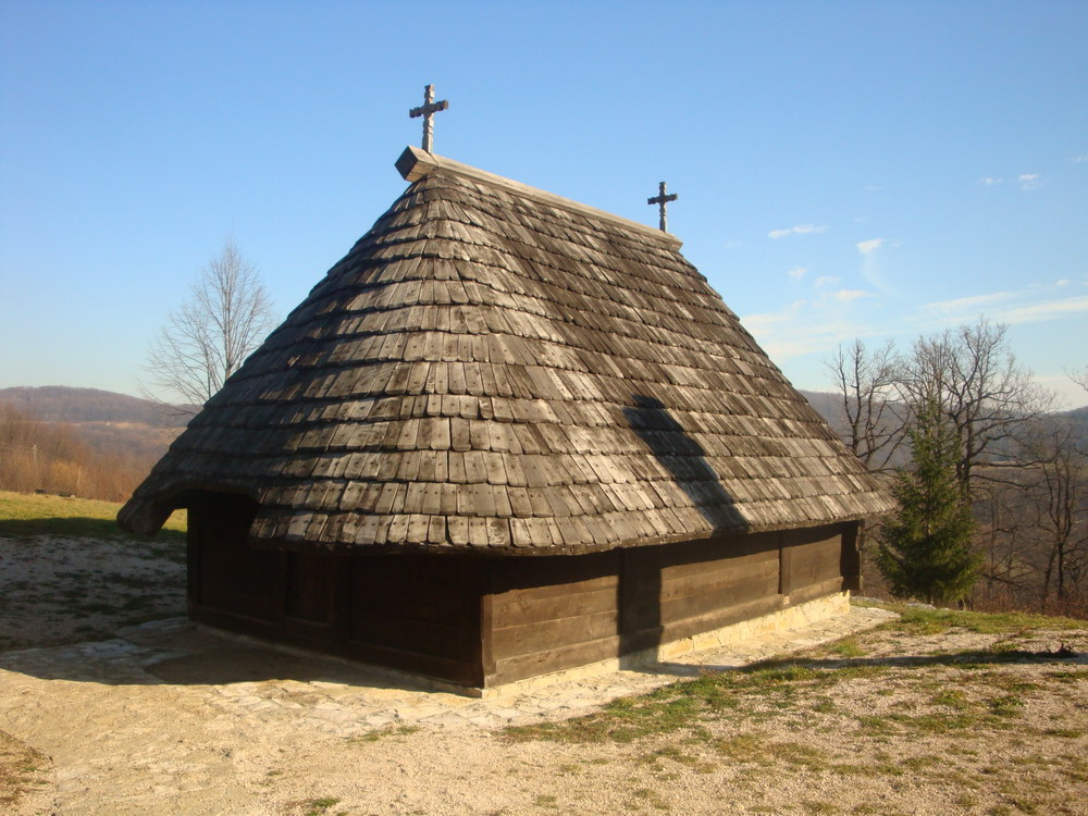 Храм_Вазнесења_Господњег_(брвнара)_у_Колима